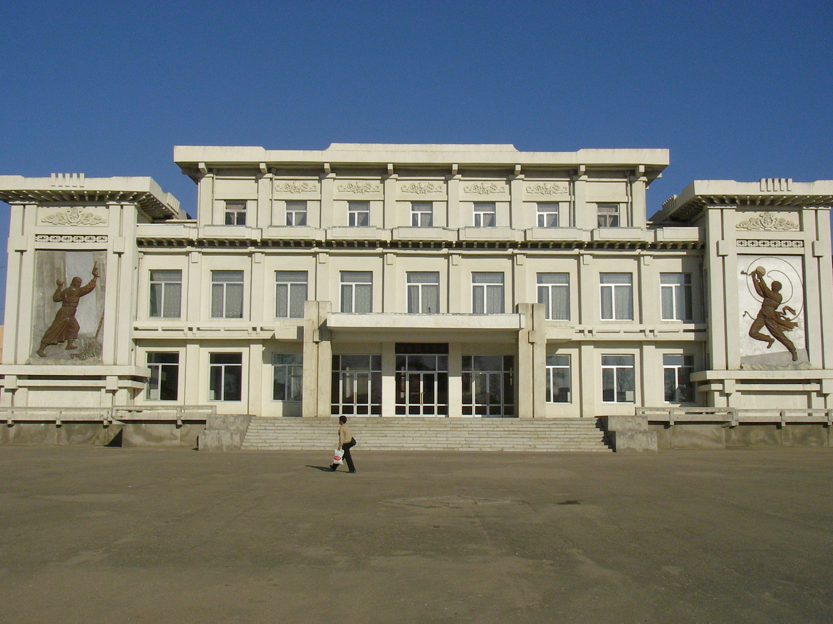 先锋俱乐部